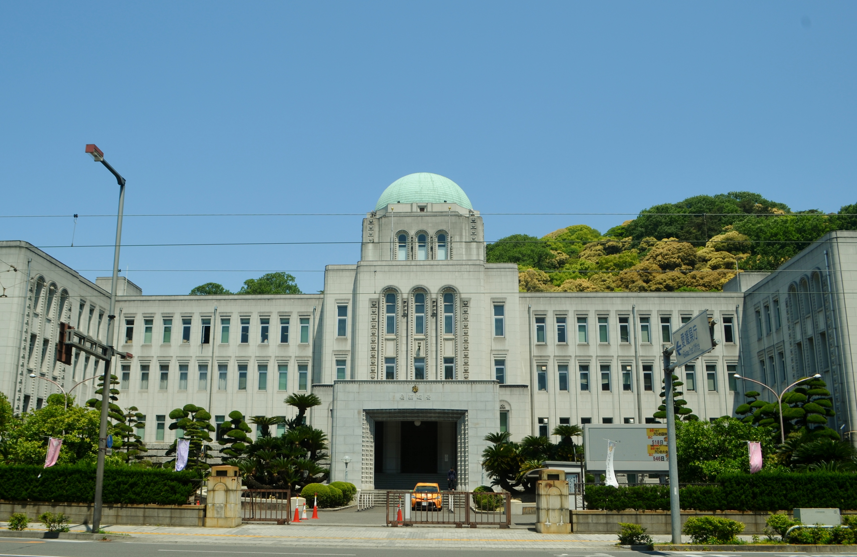 愛媛県庁舎の外観。